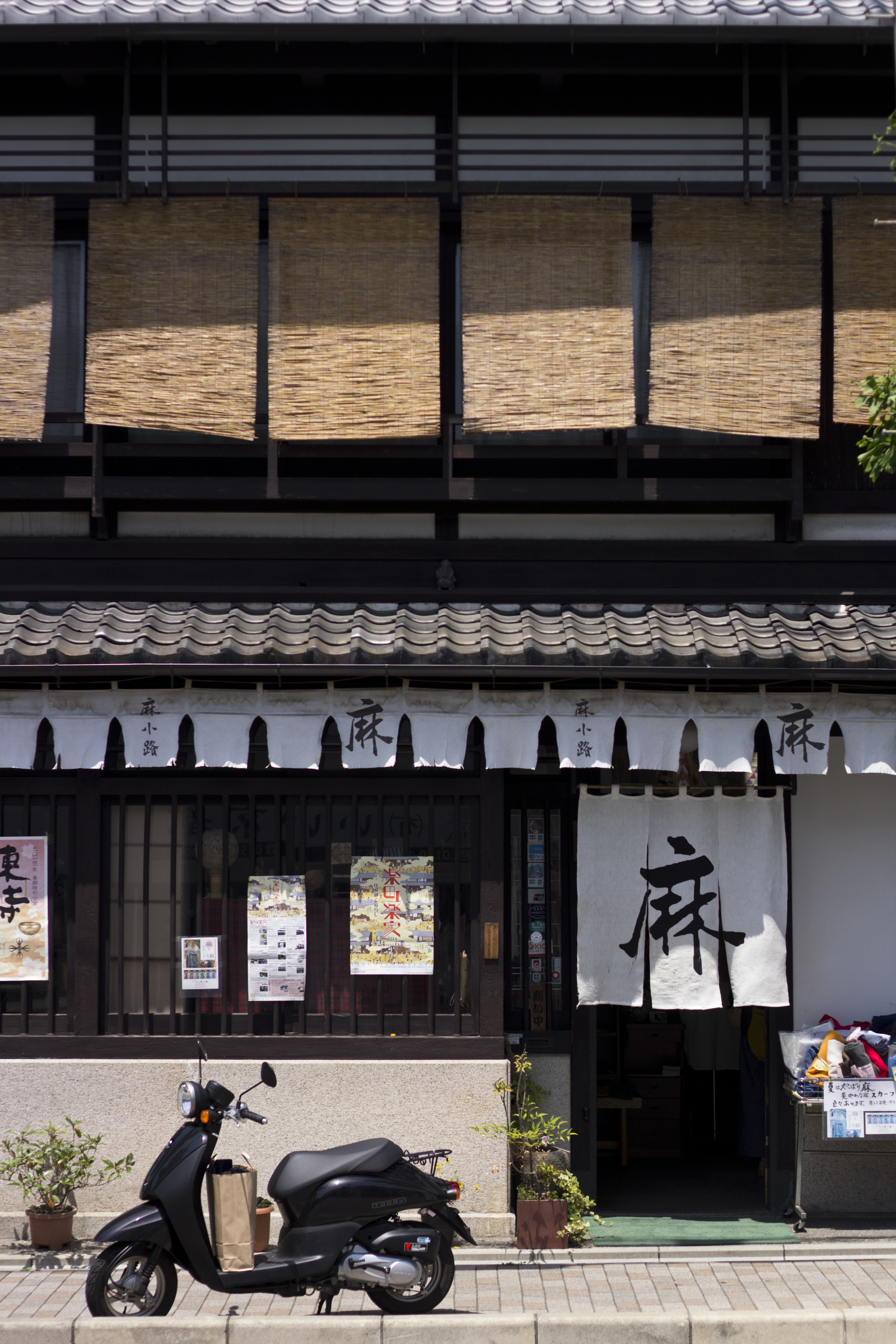 Machiya in Kyoto, near Nijojo.